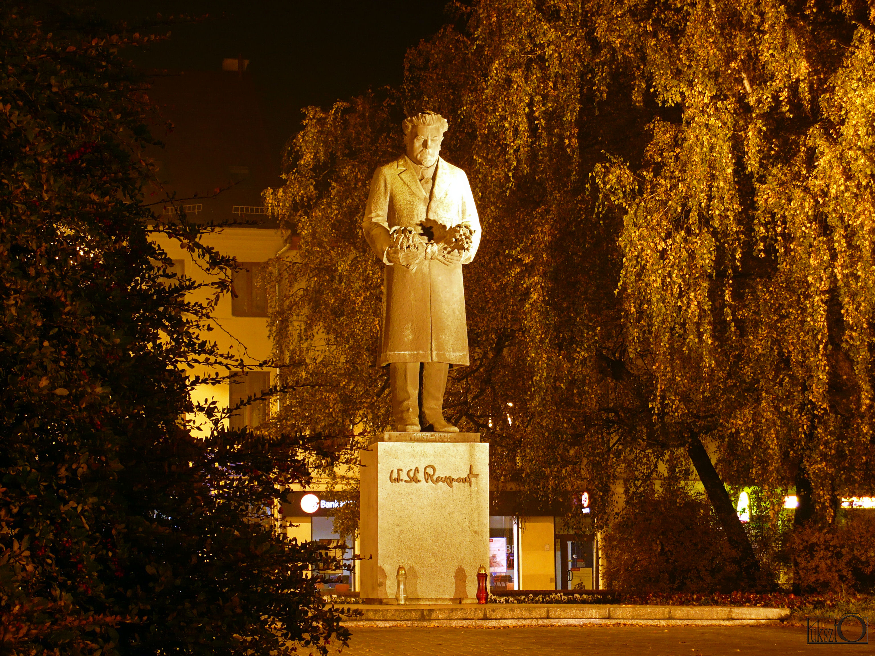 Łódź,pl. Reymonta -pomnik Władysława Reymonta